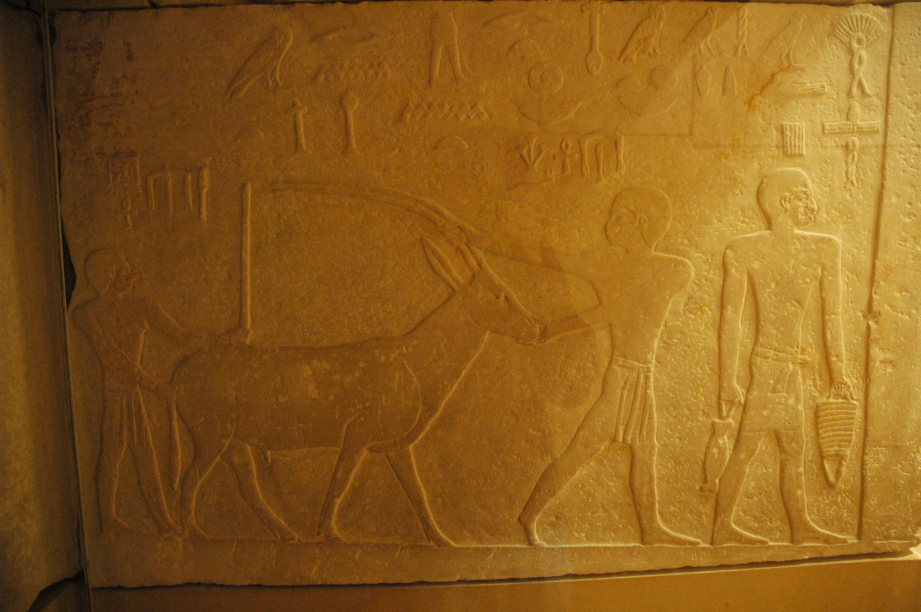 Die Kultkammer des Ka-ni-nisut im Kunsthistorischen Museum Wien von der Mastaba des Ka-ni-nisut aus Giza, Grabung Hermann Junker 1913. Südwand bei der Türleibung. Inv.Nr. 8006